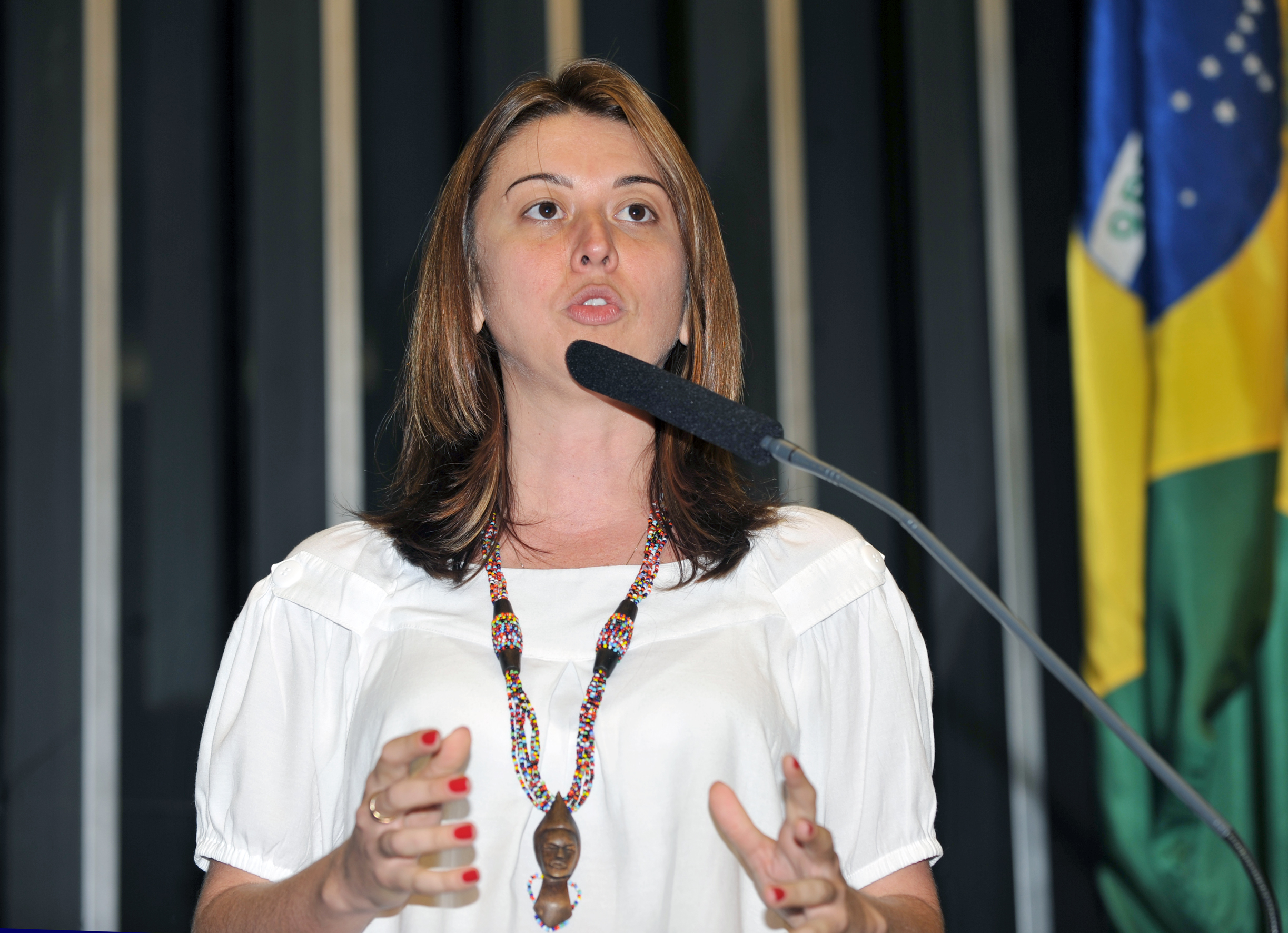 A presidente União Nacional dos Estudantes, Lúcia Stumpf, fala durante sessão solene na Câmara dos Deputados em homenagem aos 30 anos de reconstrução da entidade.